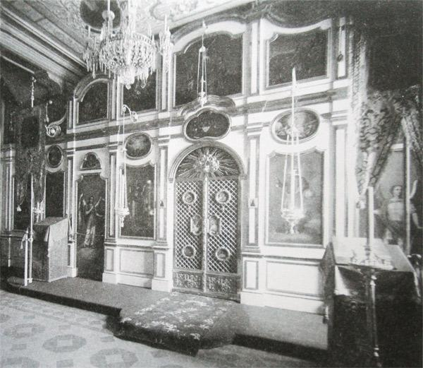 Петропавловский собор. Интерьер. Фотография 1890-х гг